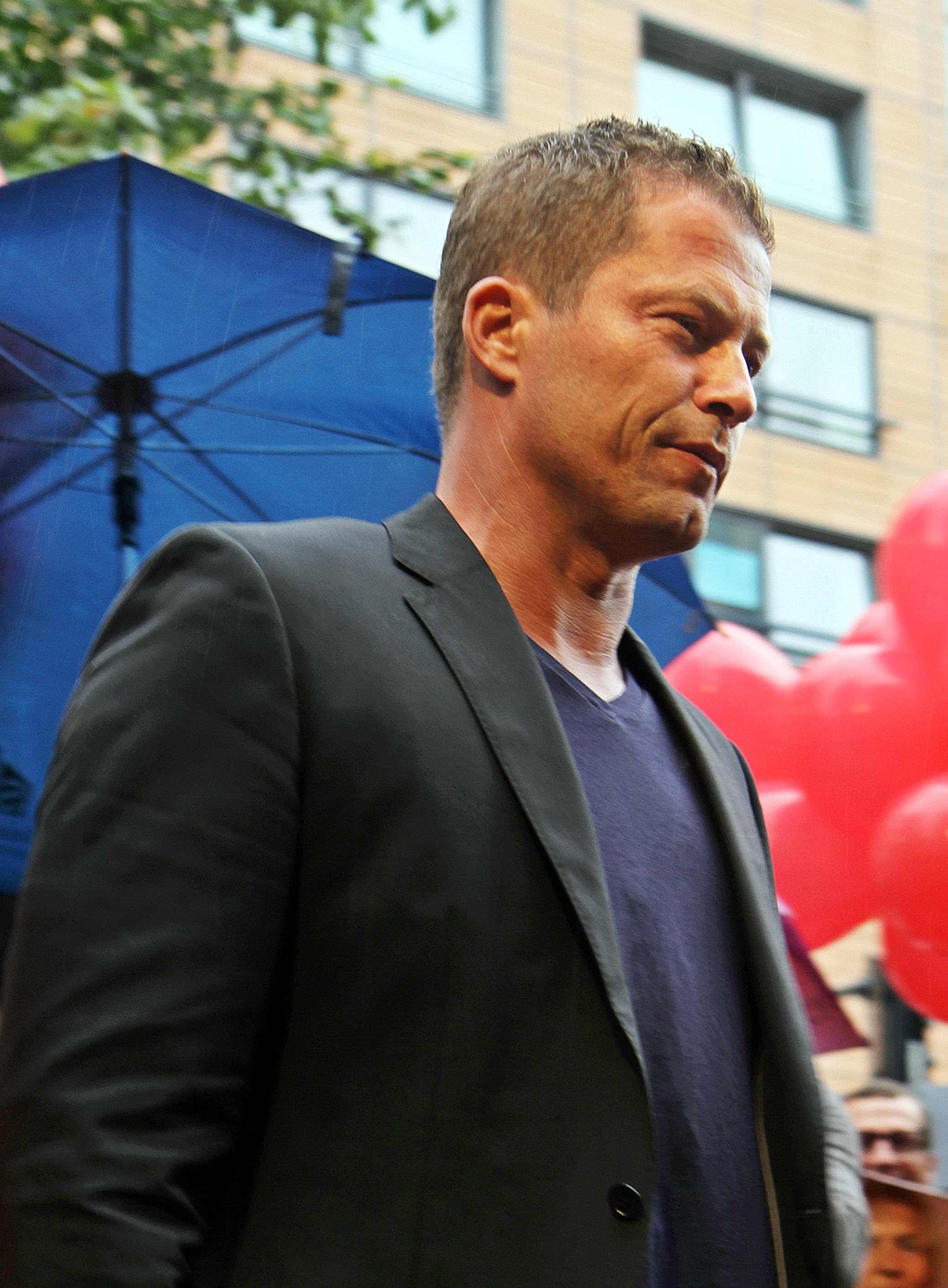 Til Schweiger (wo? bei was?)